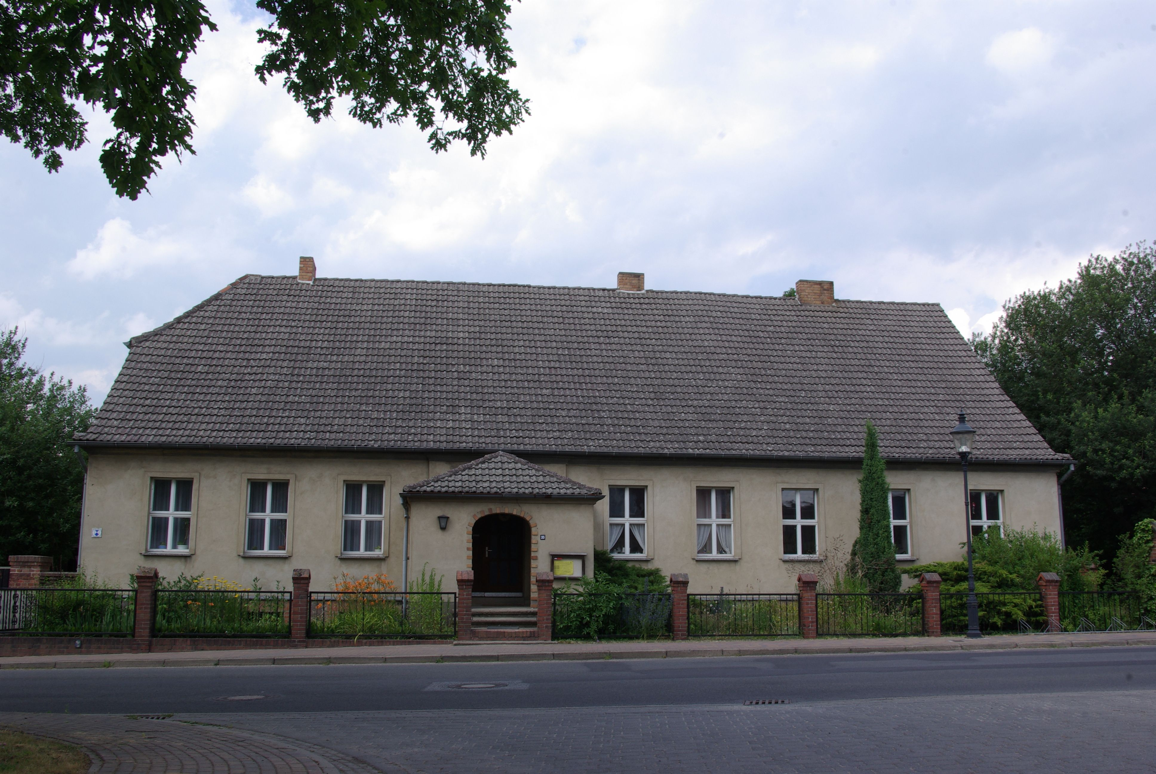 Rietz-Neuendorf Ortsteil Glienicke in Brandenburg. Das Haus in der Beeskower Straße 35 (Bundesstraße 246) in der Nähe der Kirche steht unter Denkmalschutz.